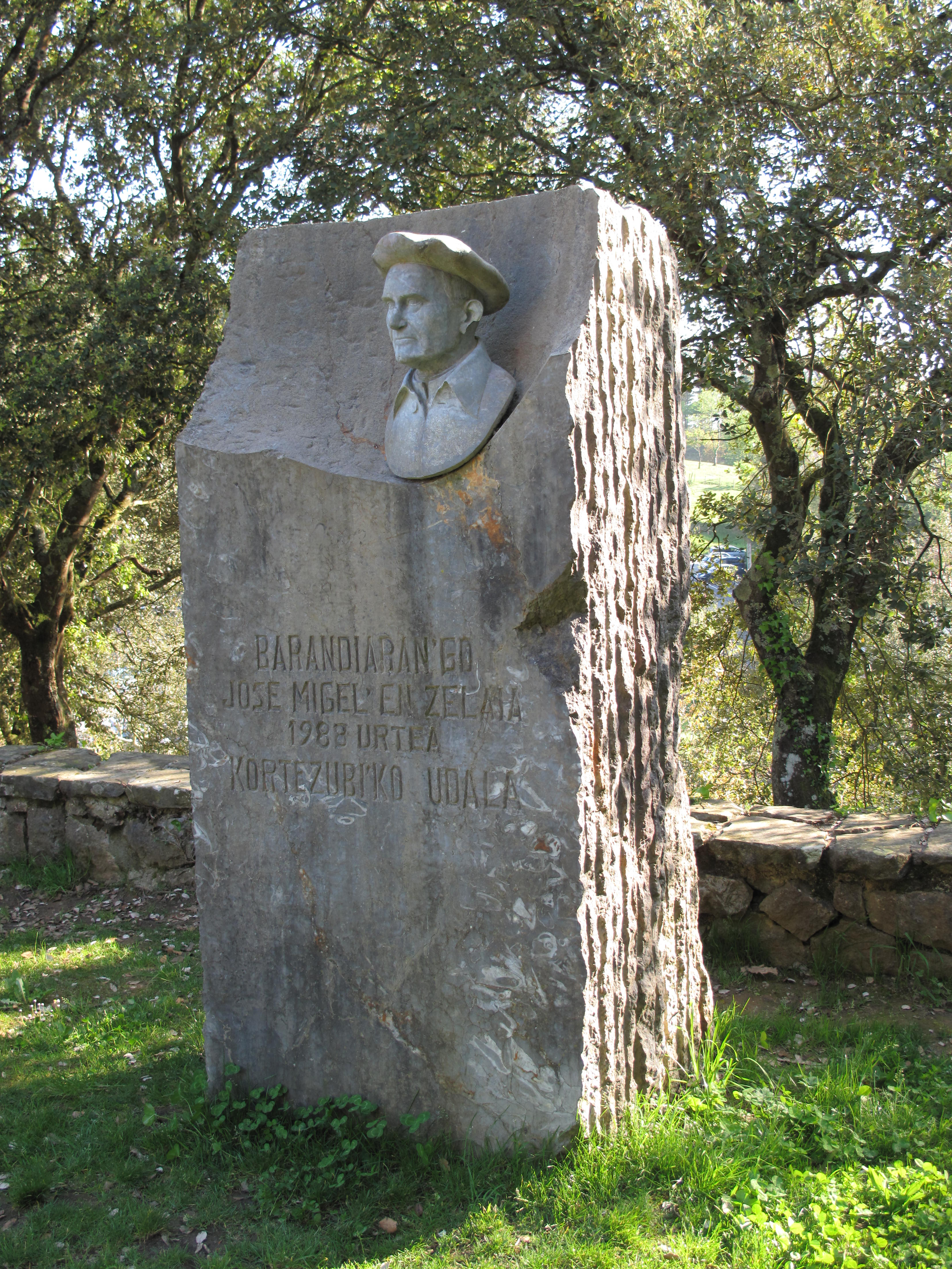 Busto de "Aita Barandiaran", D. José Miguel de Barandiran en la cueva de Santimamiñe, junto a la ermita de San Mames, la cual investigó en las primeras decadas del S.XX.